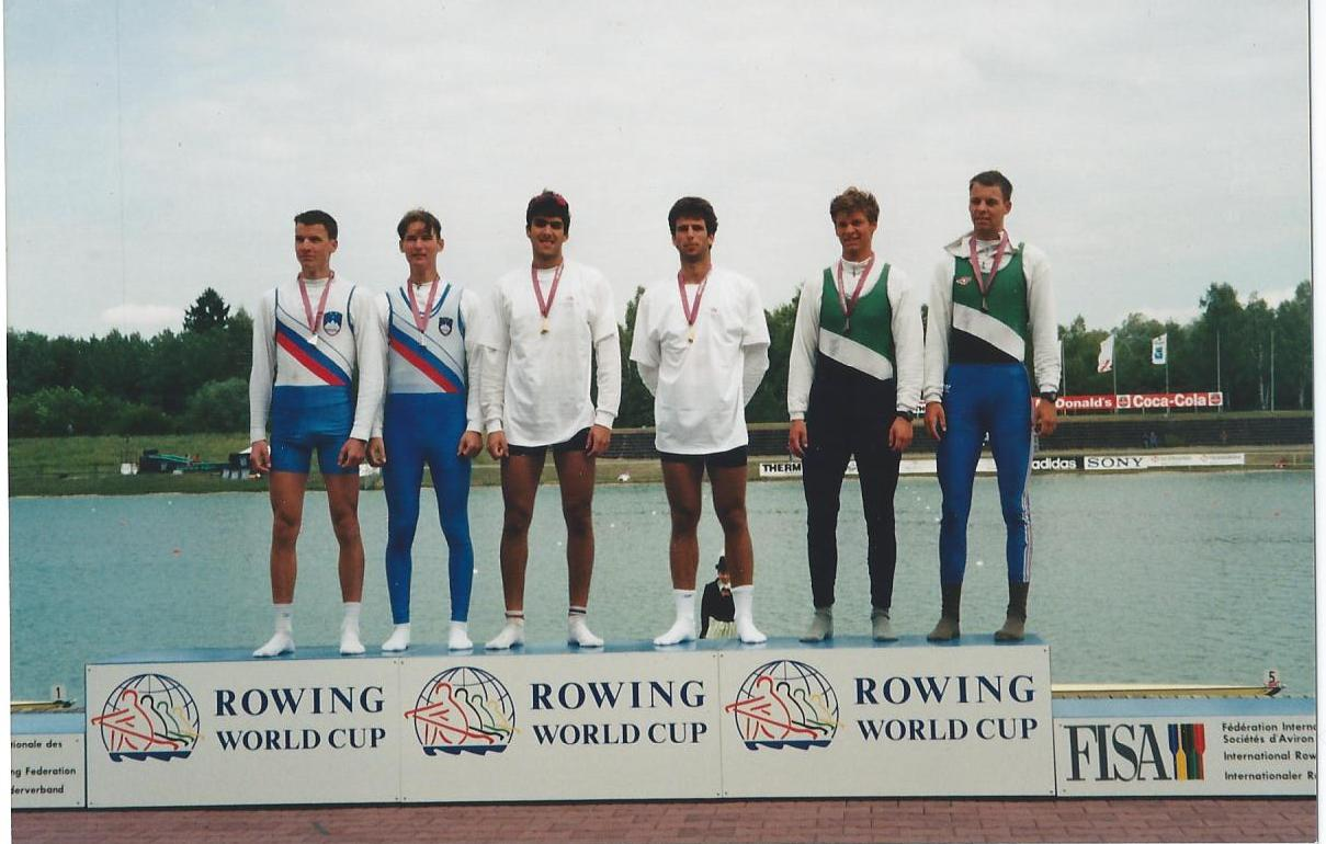 Nuno Cerqueira no pódio da Taça do Mundo de 1997, em Munique